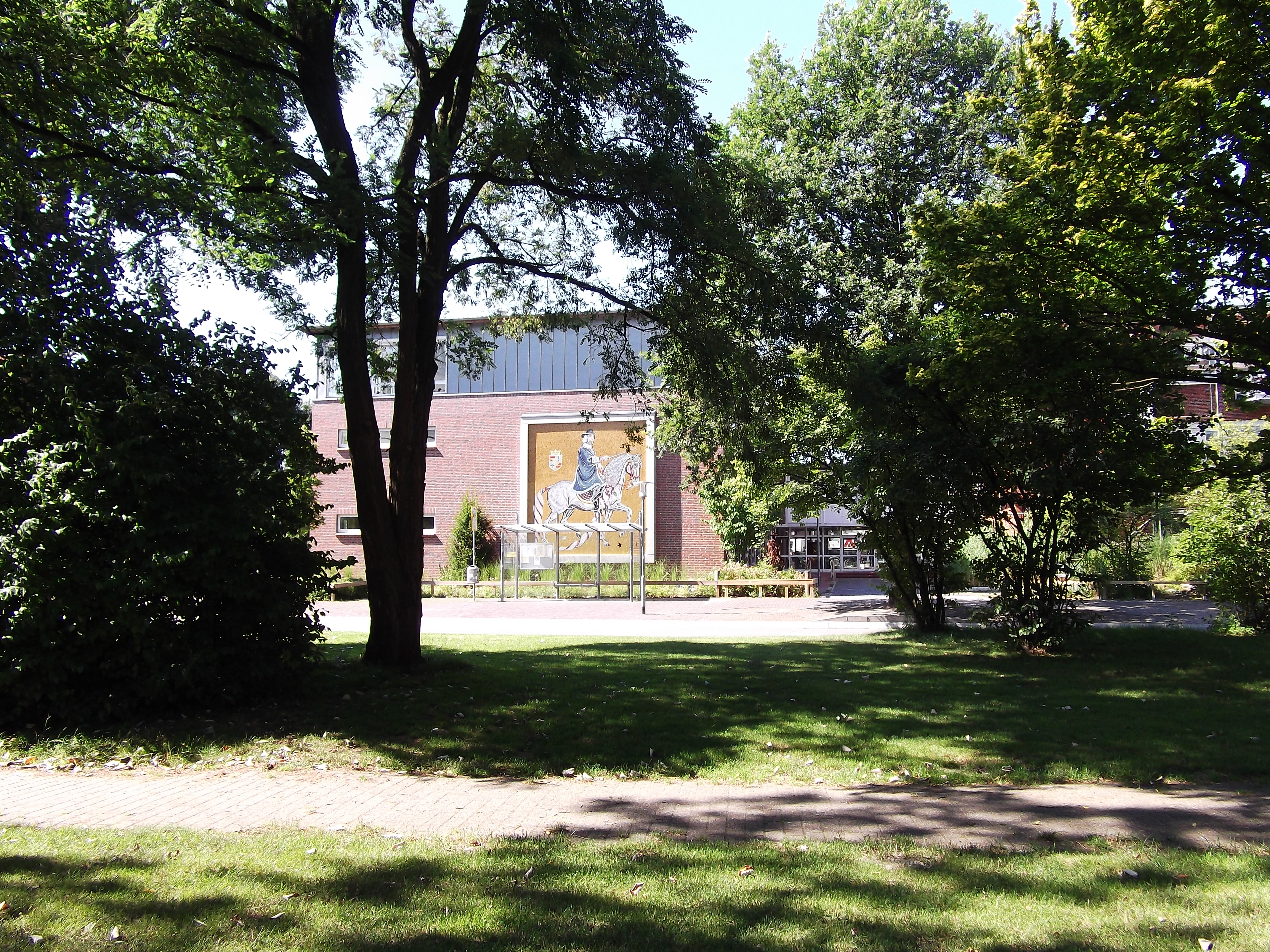 Eingangsbereich der Graf-Anton-Günther-Schule in Oldenburg (Oldb). Links vom Eingang ein Mosaik von Graf Anton Günther von Oldenburg, leicht verdeckt durch eine Bushaltestelle.